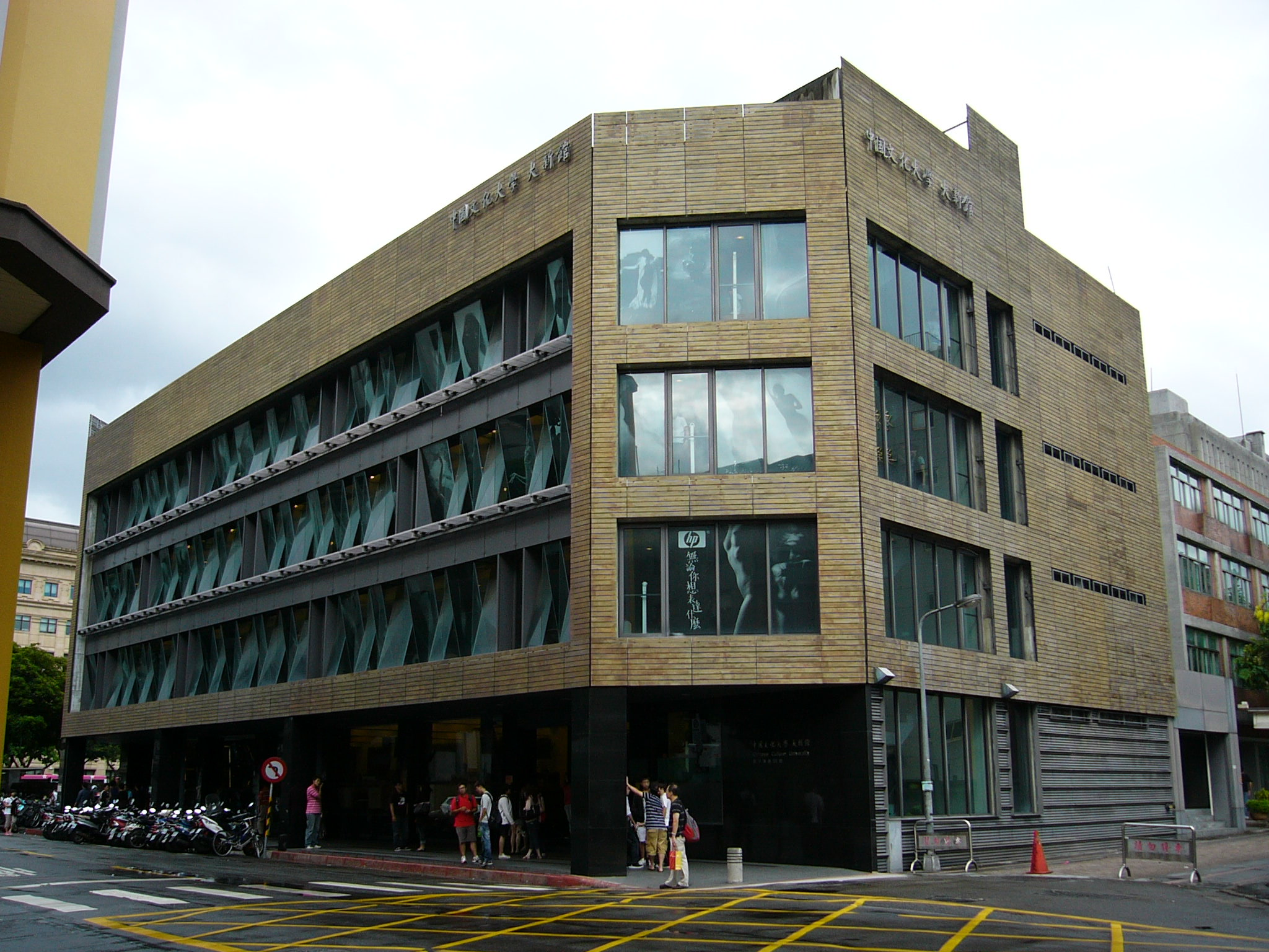 中國文化大學大新館，位於臺北市中正區延平南路127號。